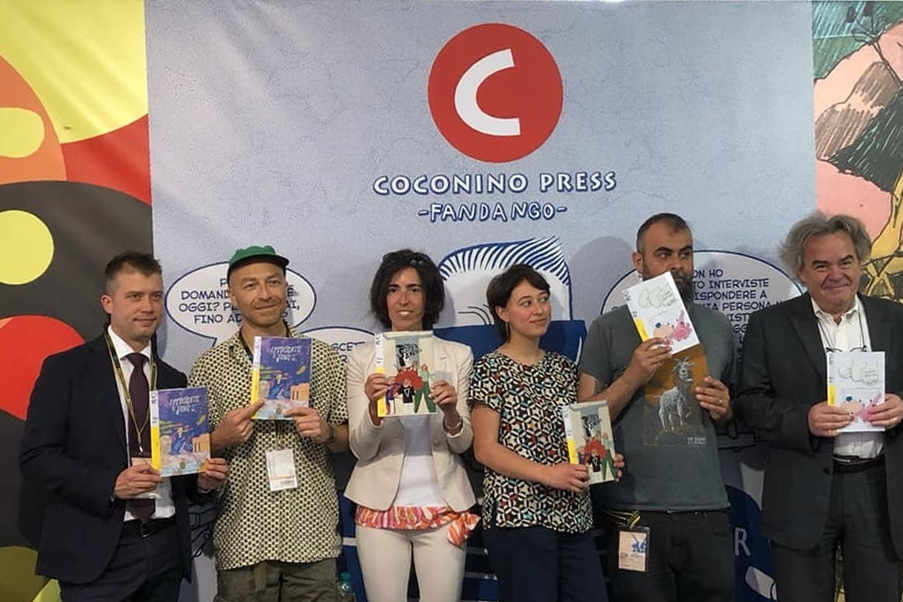 Presentazione al Napoli Comicon 2018 degli albi del progetto Fumetti nei Musei (di MiBACT e Coconino Press) ambientati in Campania, con autori e rappresentanti delle istituzioni museali coinvolte. Da sinistra il direttore del parco archeologico di Paestum Grabriel Zuchtriegel, Dottor Pira, la vicedirettrice del Museo archeologico nazionale di Napoli, ZUZU, Maicol & Mirco e il direttore della Reggia di Caserta Mauro Felicori.